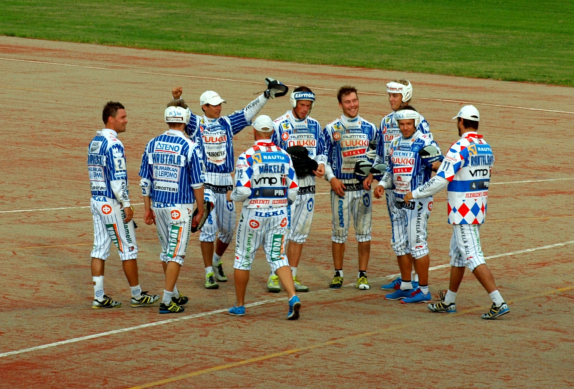 Alajärven Ankkurit - Vimpelin Veto pesäpallo-ottelu 10.8.2014.